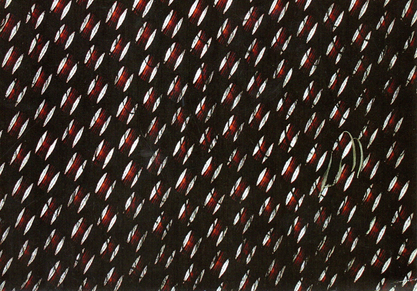 "Espermatofeminis", tapís, 200x300 cm., Carles Delclaux, 2009